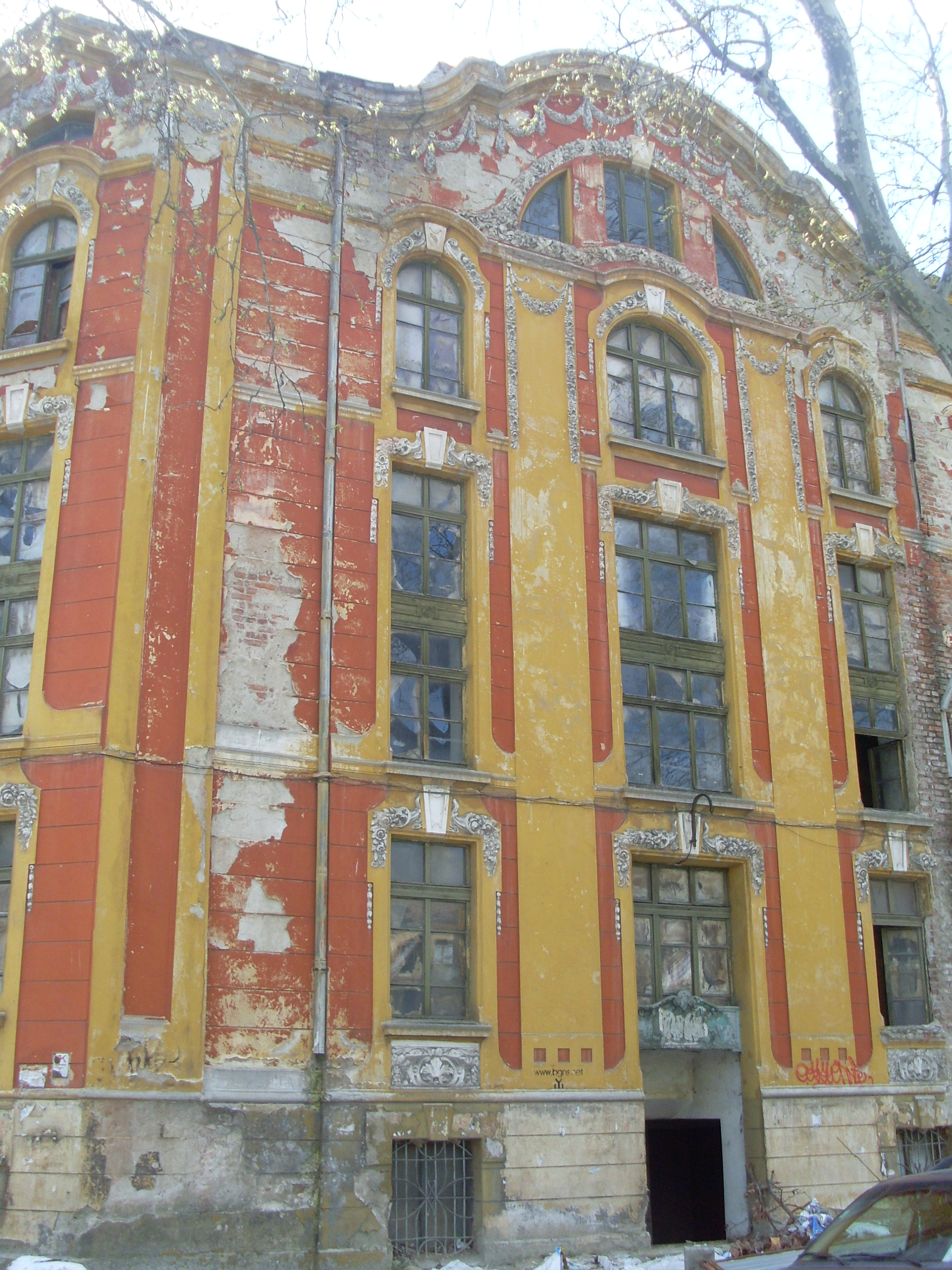 Arquitectura búlgara en Plovdiv, Bulgaria, 2011